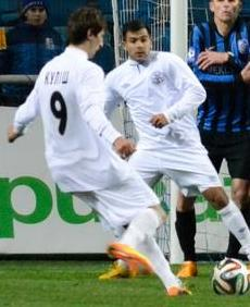 Станіслав Куліш, зліва, пробиває штрафний удар